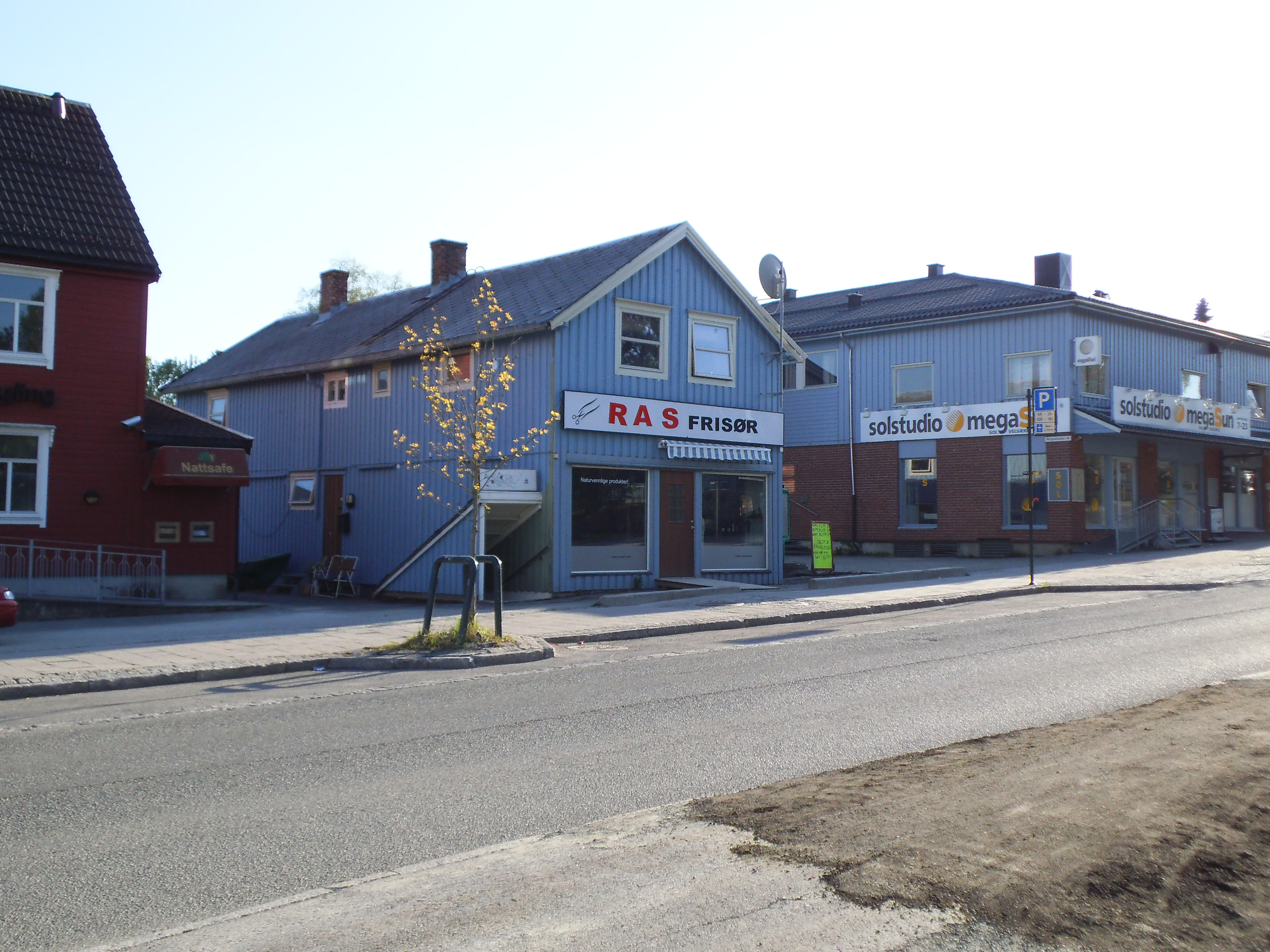 Noen forretningsbygg langs Ringåsveien på Heimdal.